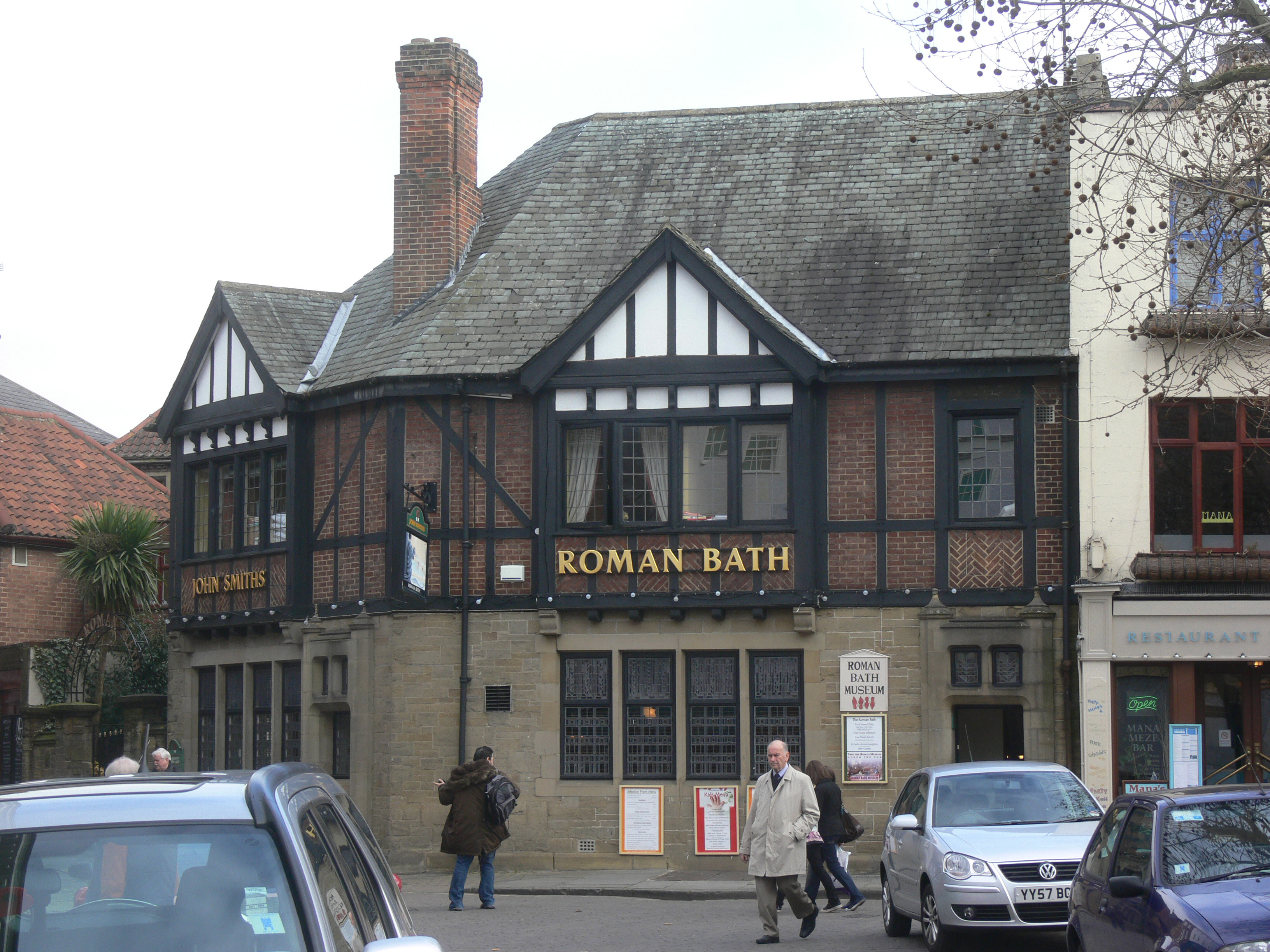 Römisches Bad in York, Museum.